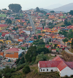 Pueblo San Joaquín